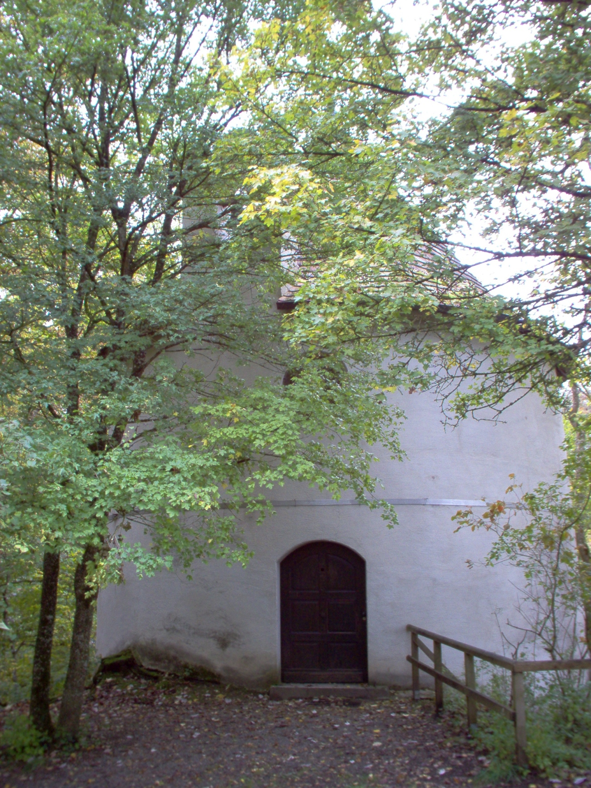 Kapelle der Ruine Bittelschieß